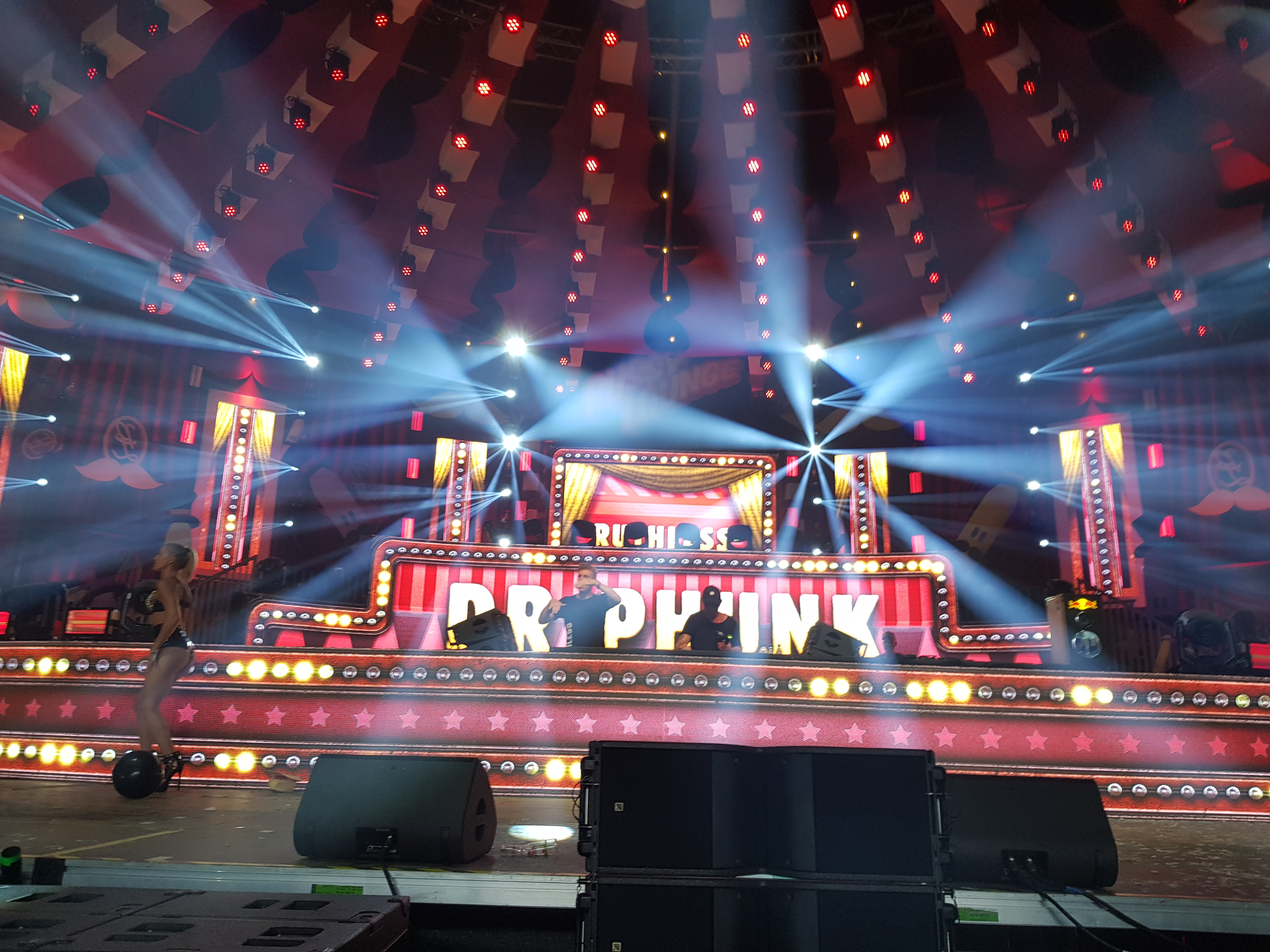 Electric Love Festival 2018 Pussy Lounge Stage Dr Phunk 1